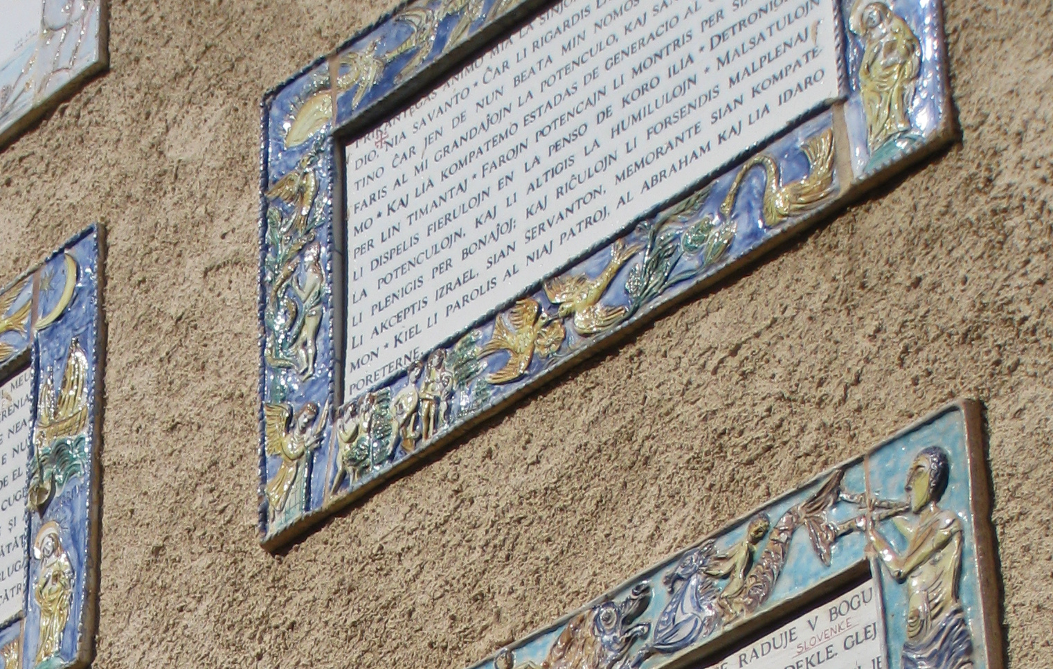 Kirko de la vizito en Ejn Kerem, Jerusalemo - preĝo Magnificat